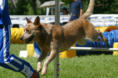 File di mia creazione